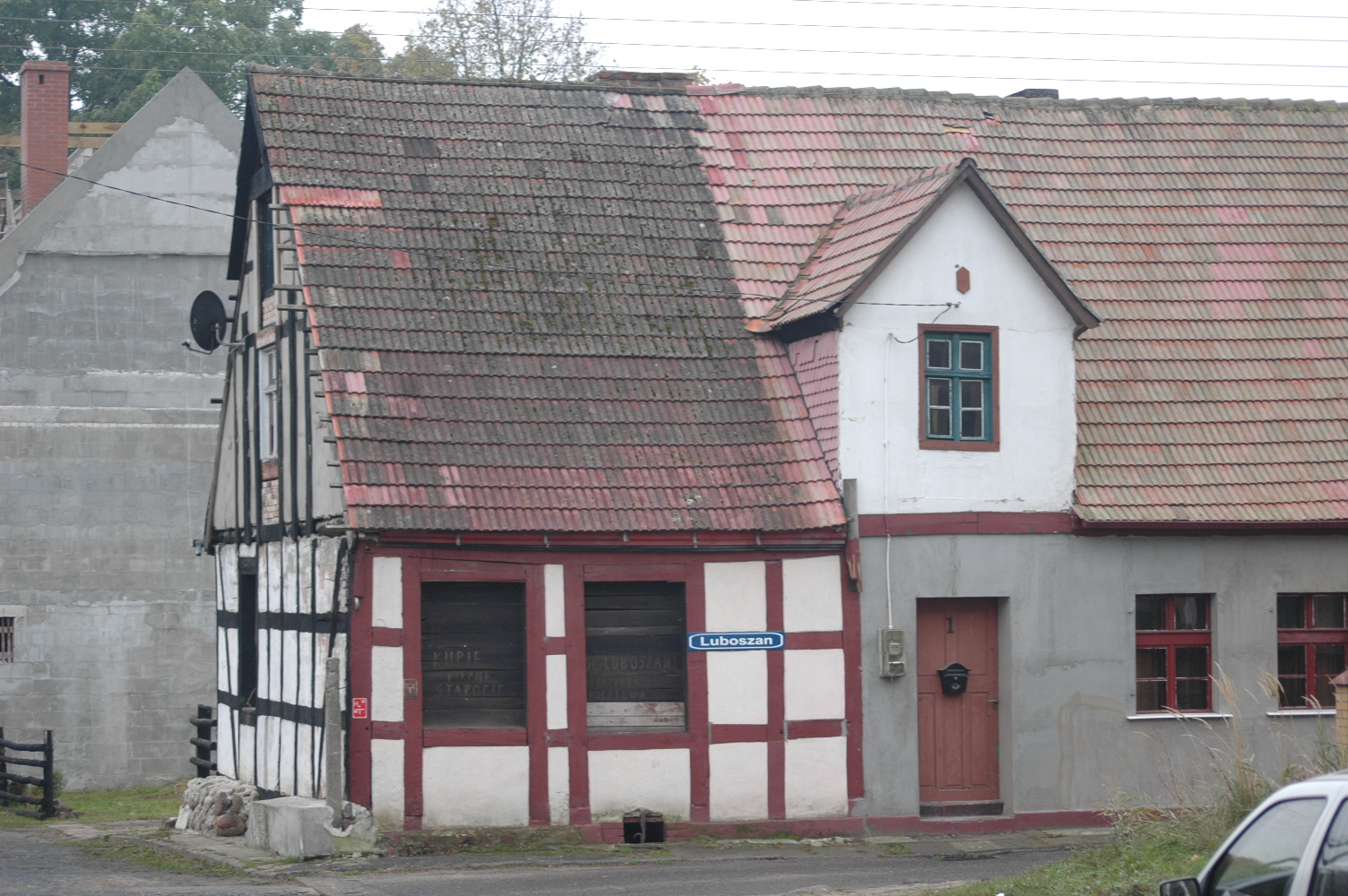 Zabytkowy dom przy ulicy Luboszan 1 w Nowogardzie.